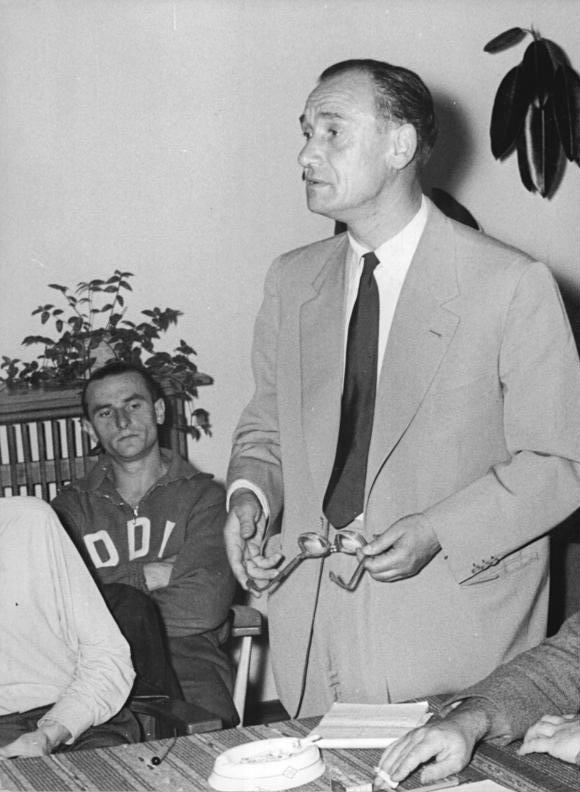 Zentralbild-Funck Bey-Qu 9.9.1955 Fußball-Auswahl vor Rumänienspiel - Am Donnerstag, dem 8.9.1955, trugen die Auswahlspieler der DDR im Berliner Walter-Ulbricht-Stadion Übungsspiele gegen Motor Berlin bezw. Dynamo Berlin aus. In einer anschließenden Besprechung erläuterte DDR-Trainer Janos Gyarmati den taktischen Spielplan gegen Rumänien am 18.9. in Bukarest. UBz. Janos Gyarmati während seiner Ausführungen. Links: Mannschaftskapitän "Moppel" Schröter."